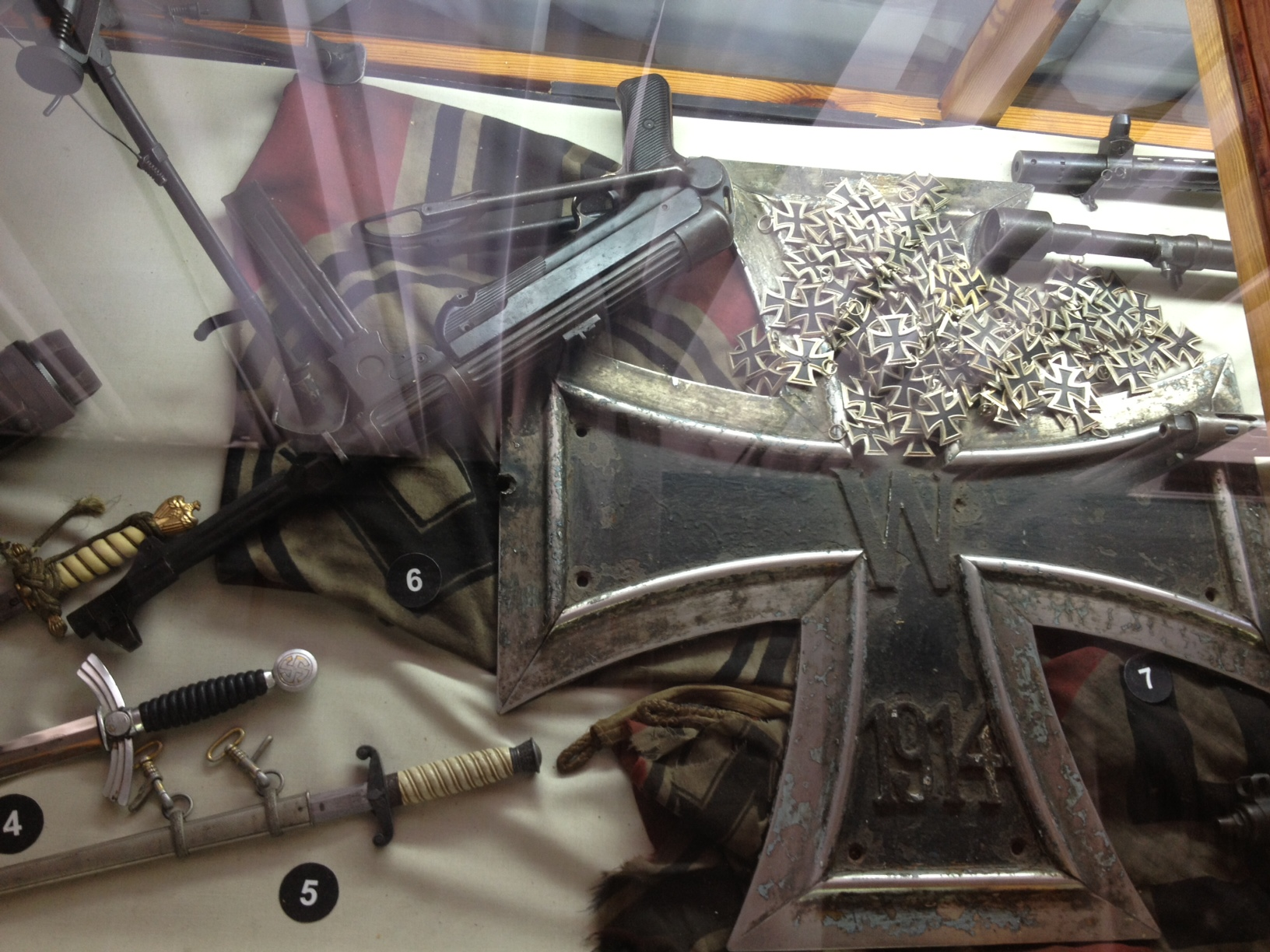 Эмблема в виде Железного креста, снятая с боевой рубки немецкой подводной лодки U-9, музей Черноморского флота, Севастополь